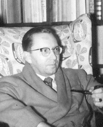 Ludwig Jedlicka in his study in 1958